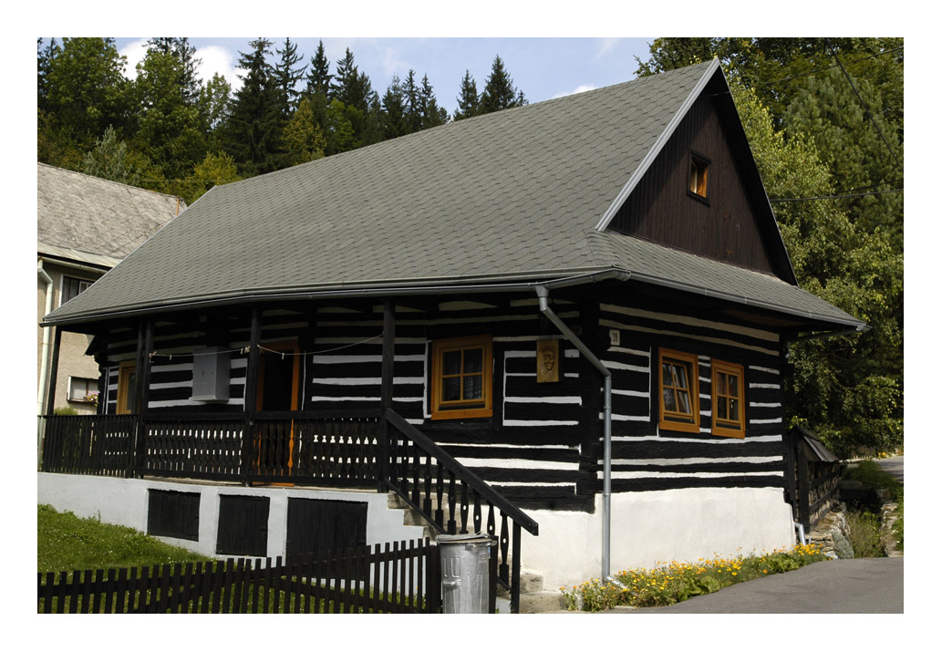 Čremošné